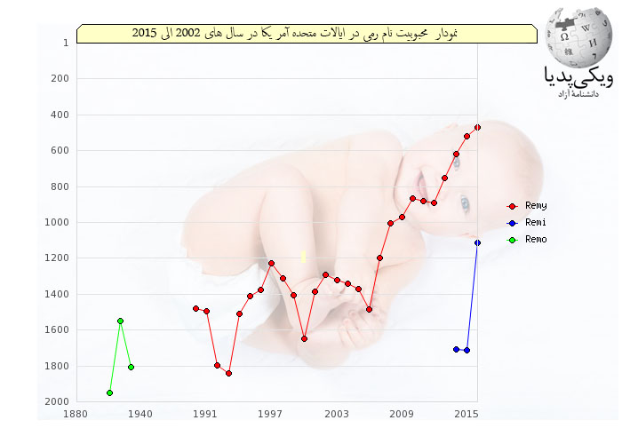 نمودار محبوبیت نام رمی در ایالات متحده آمریکا در سال های 2002 تا 2015